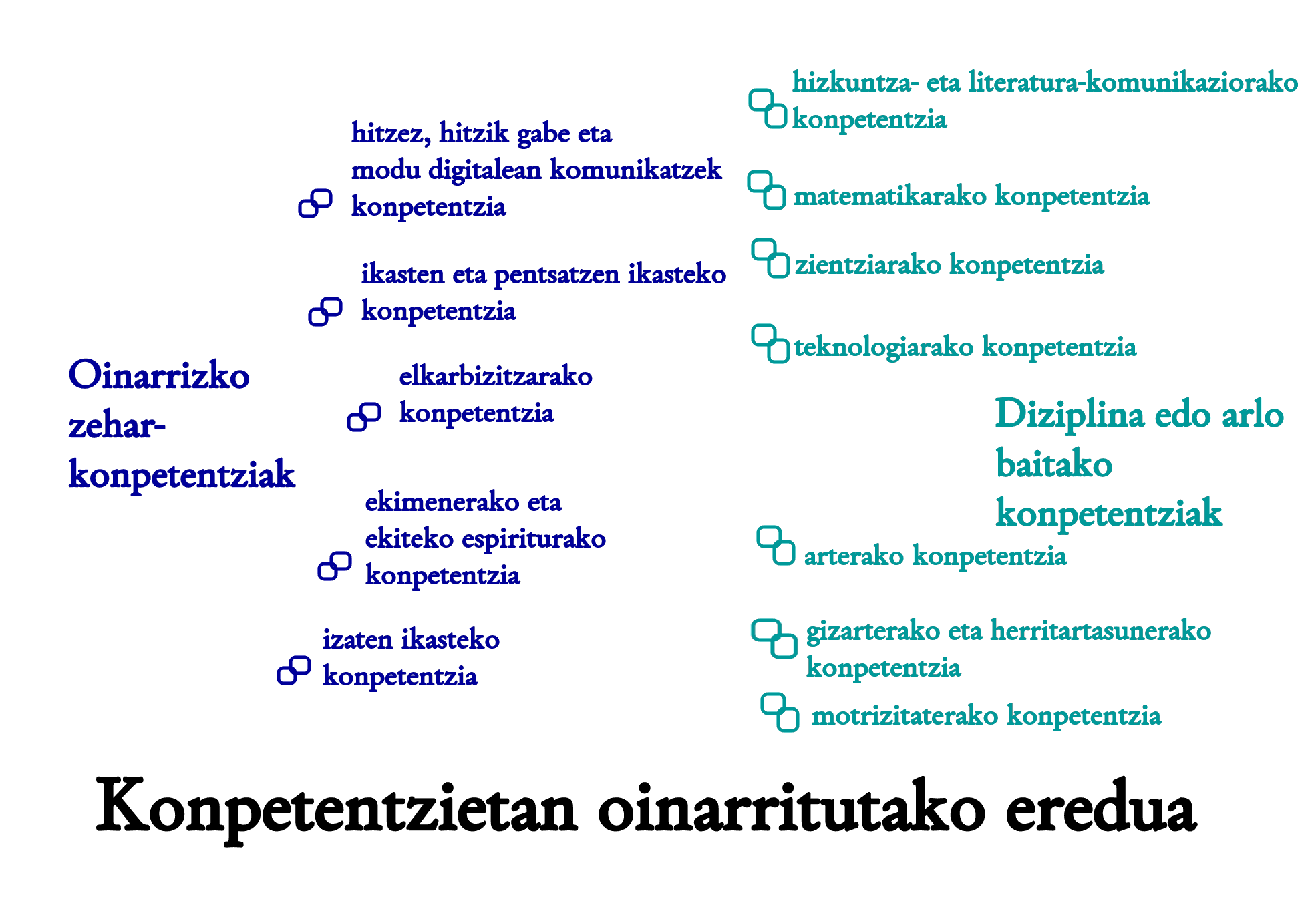 Konpetentzietan Oinarritutako Curriculum eredua. Oinarrizko zehar-konpetentziak eta Diziplina baitako konpetentziak EAEko 2015 Dekretuen arabera.